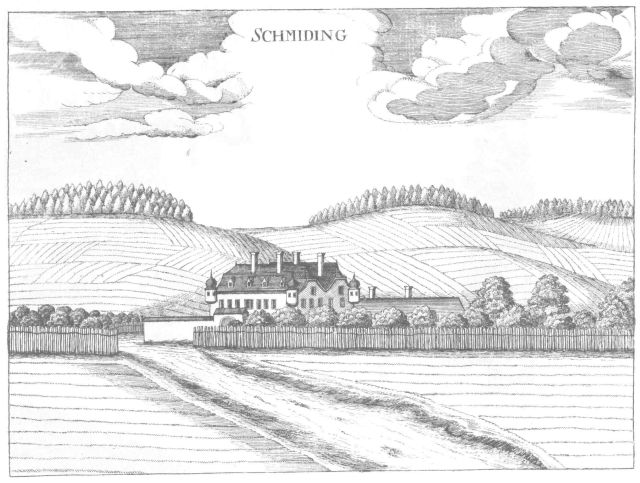 Schloss Schmiding nach einem Stich von Georg Matthäus Vischer von 1674